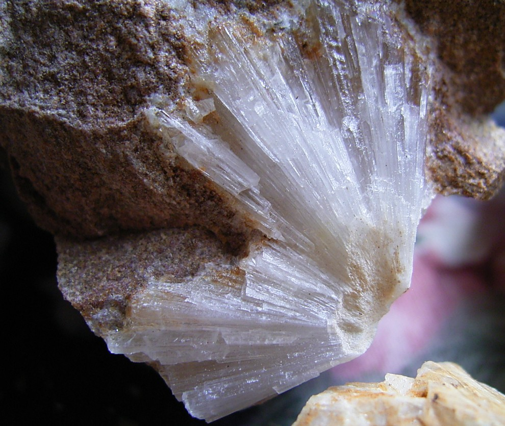 Aragonit_Schwarzleograben,Leogang,Saalfelden,Österreich